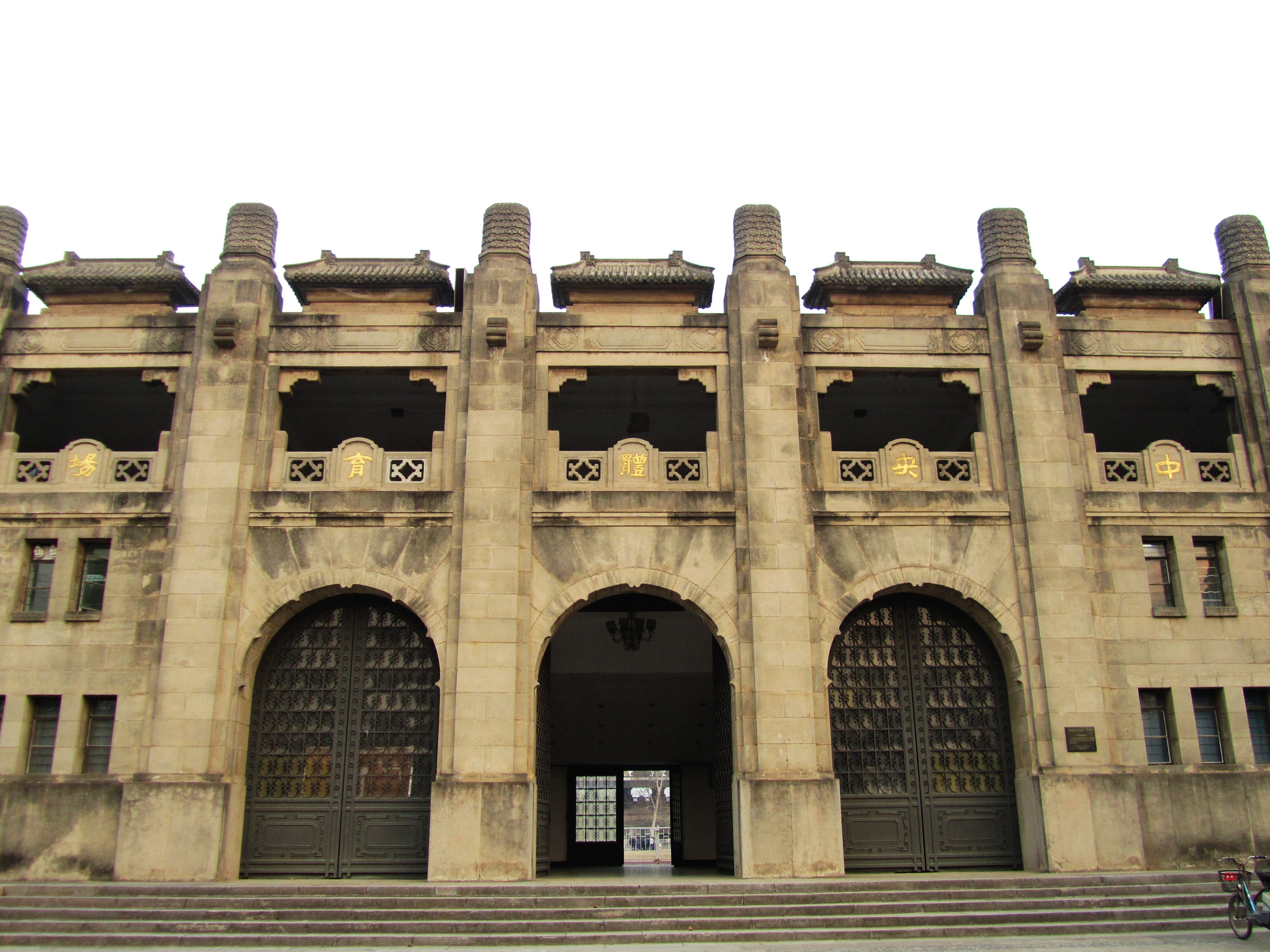 中央体育场旧址，今南京体育学院。